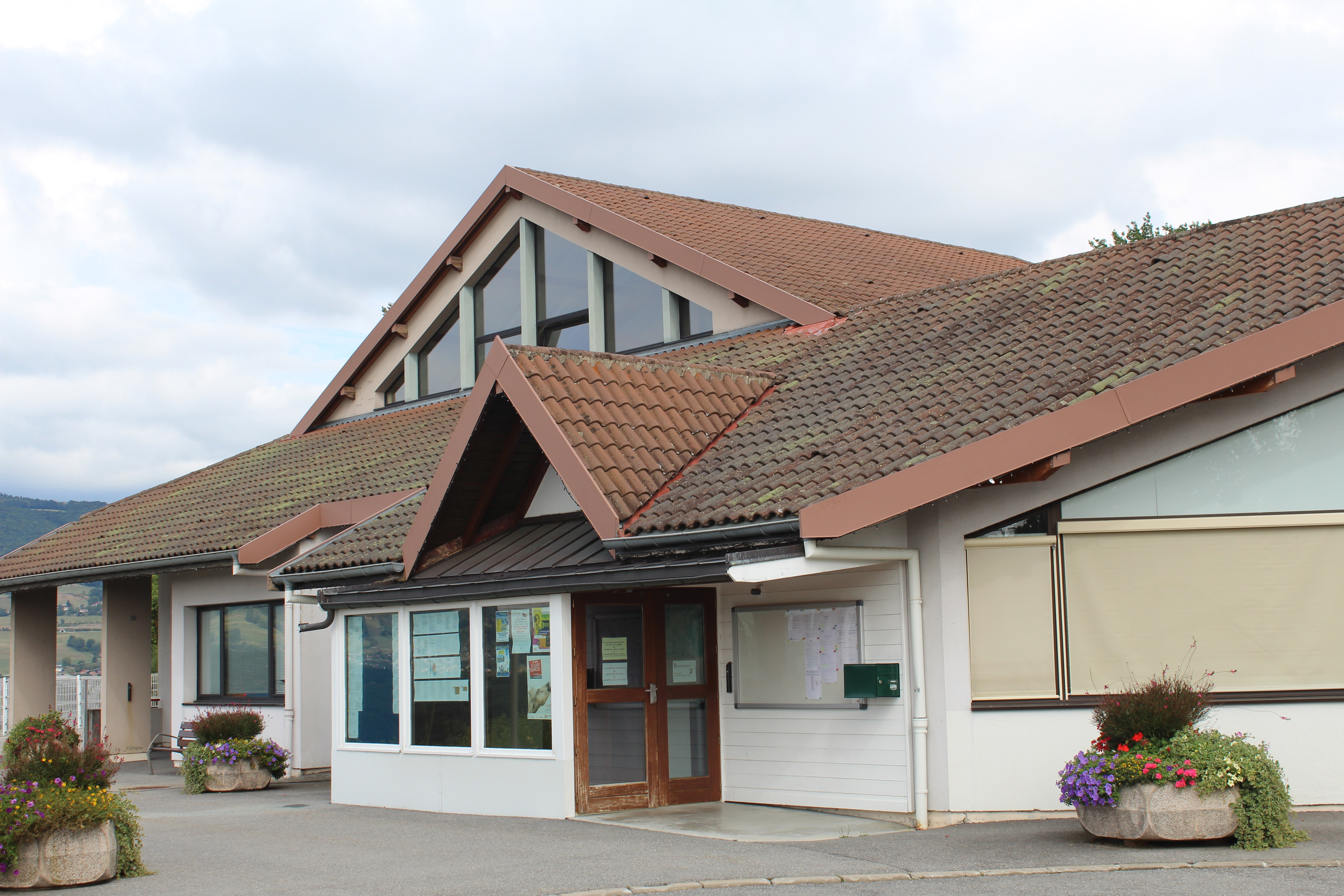 Mairie de Cercier.